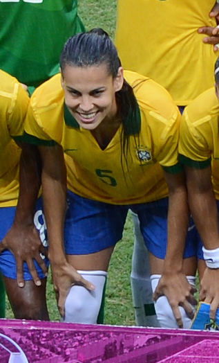 Thaisa de Moraes Rosa Moreno